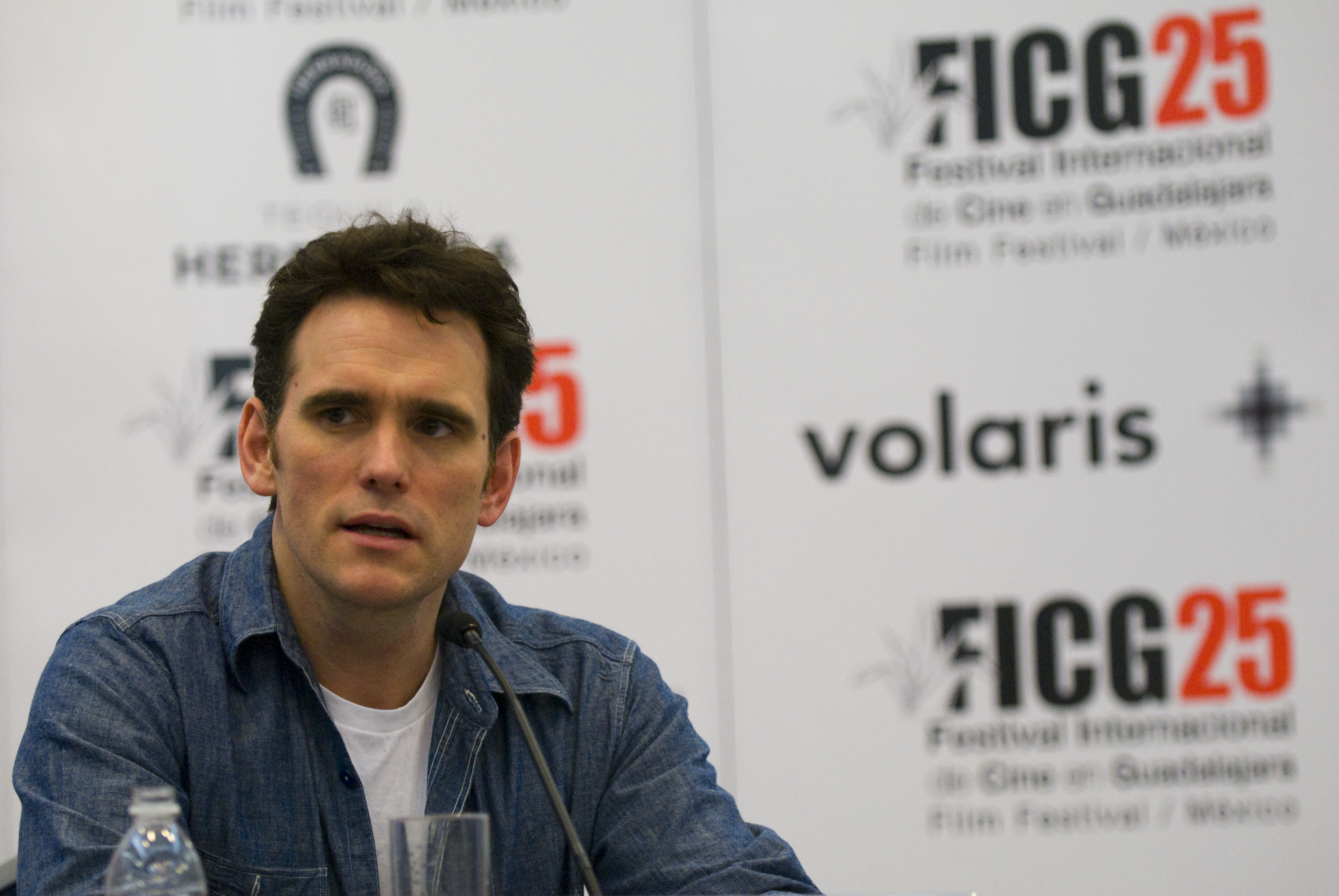 Conferencia de prensa de Matt Dillon, Premio Guadalajara Internacional, en el marco del Festival Internacional de Cine de Guadalajara en su edición 25. 12 de Marzo, 2010. Guadalajara, México. © Cortesía FICG25 / Michel Amado Carpio.